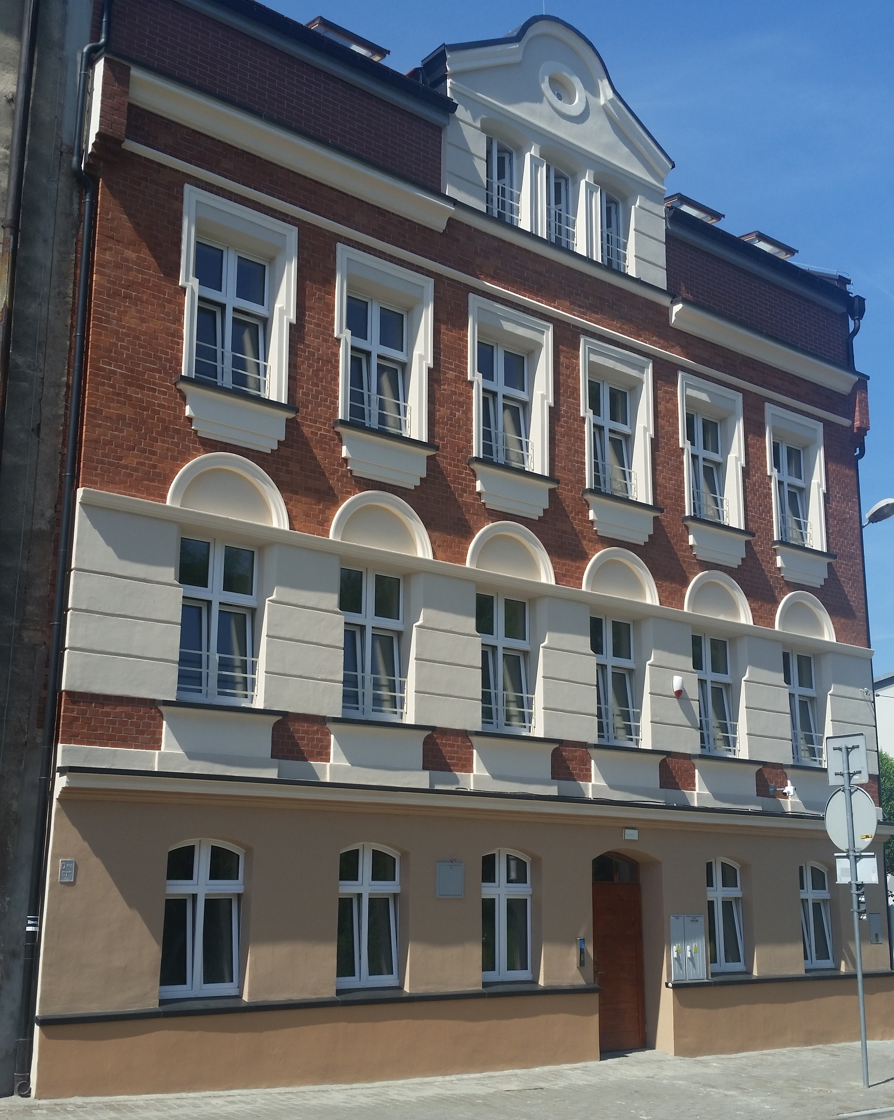 Studentenwohnheim der Staatlichen Rittmeister-Witold-Pilecki-Hochschule Oświęcim in Małopolska